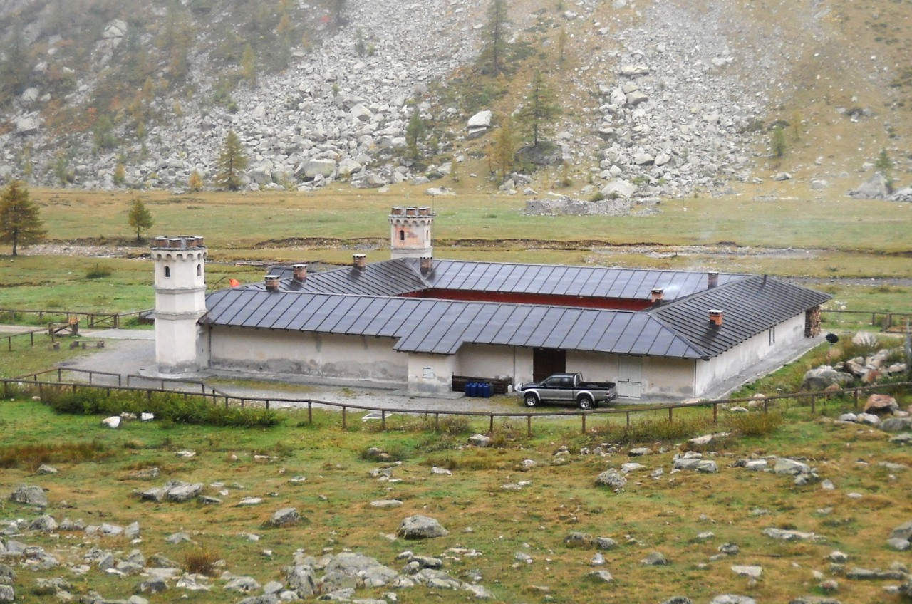 Rifugio Valasco (ex Casa di Caccia Reale) al Pian del Valasco (Terme di Valdieri, valle Gesso